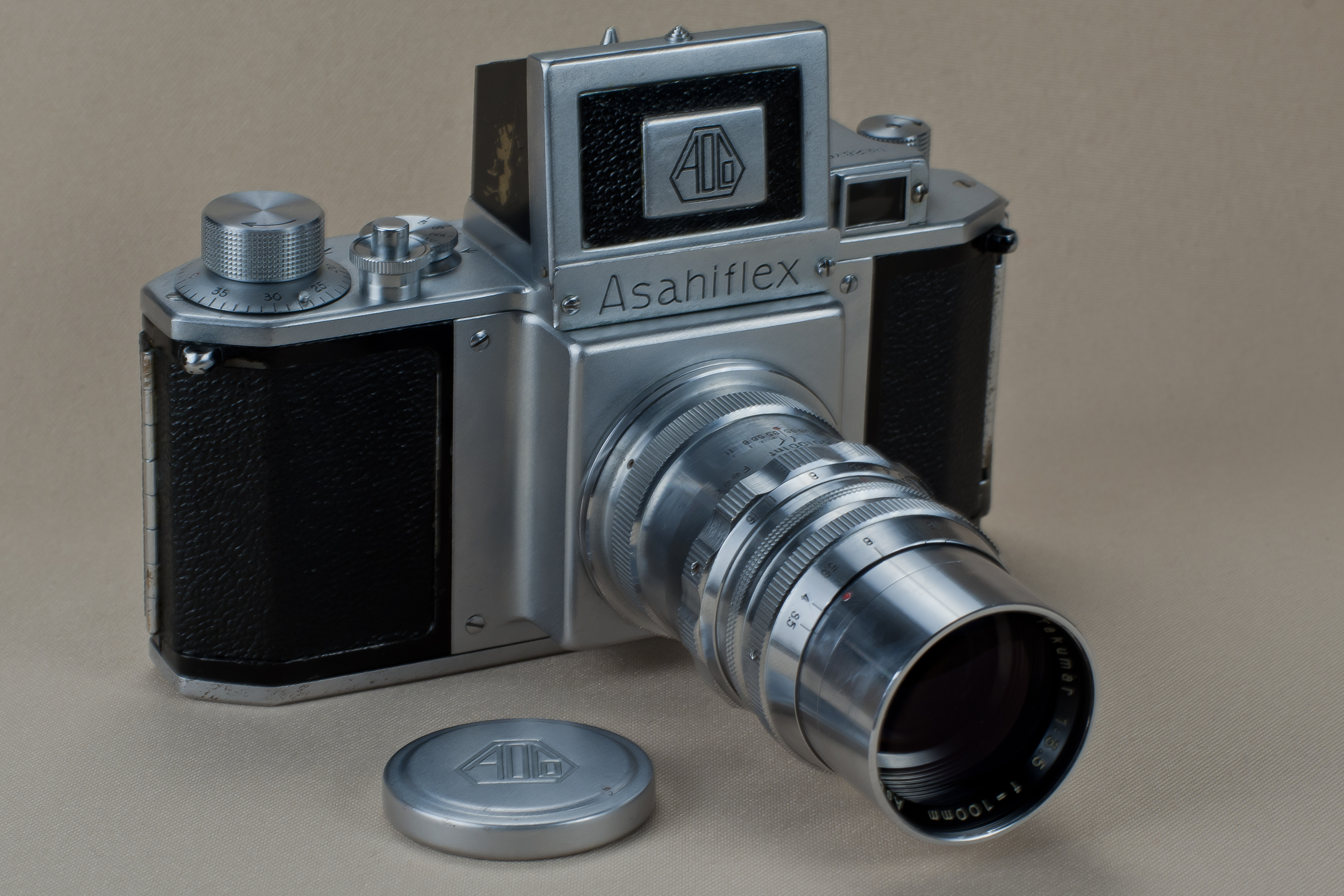 Asahi Pentax I with Asahi-Kogaku Takumar 3,5 f=100 mm